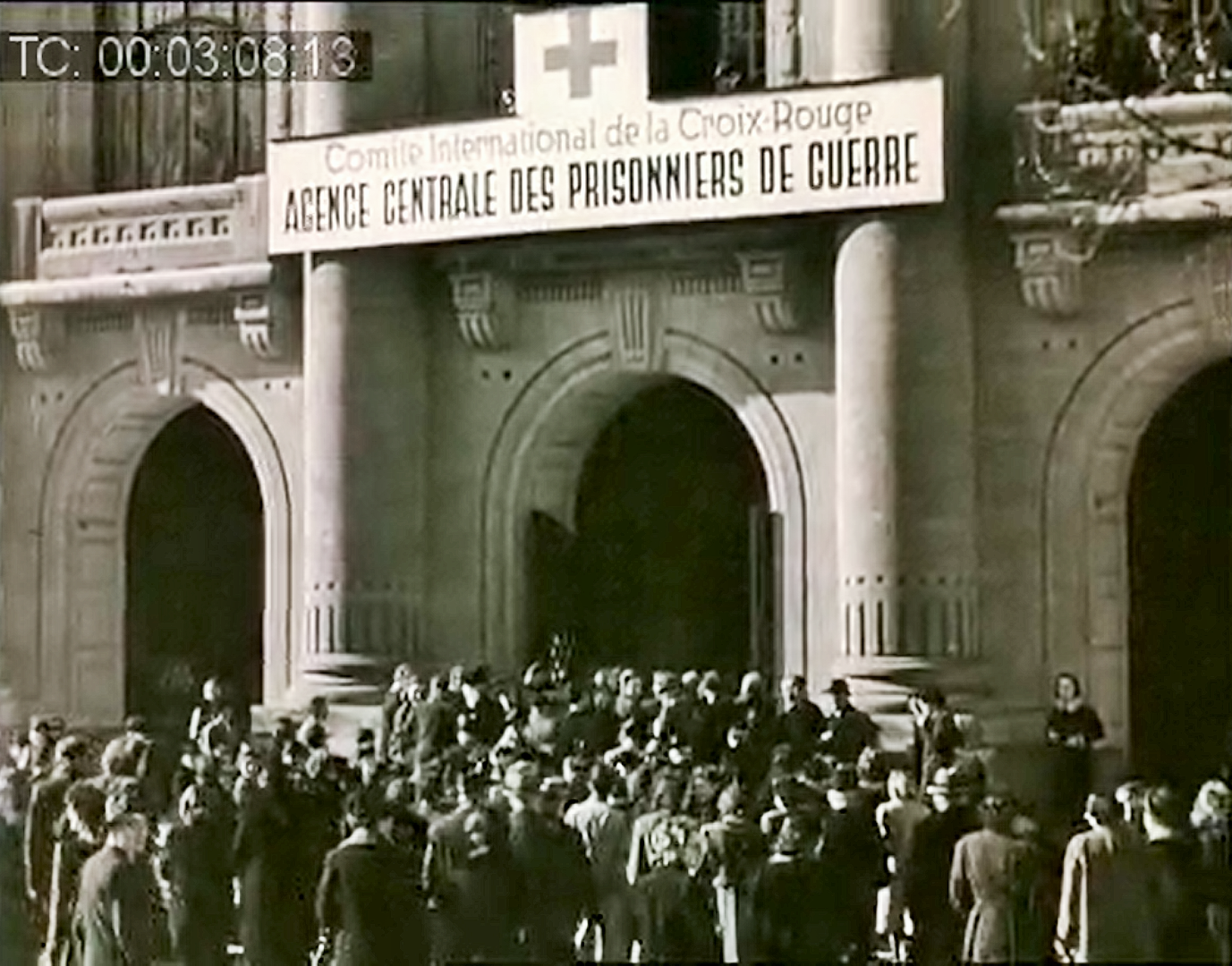 Internationale Zentralstelle für Kriegsgefangene, Palais du Conseil Général, Genf, 1941